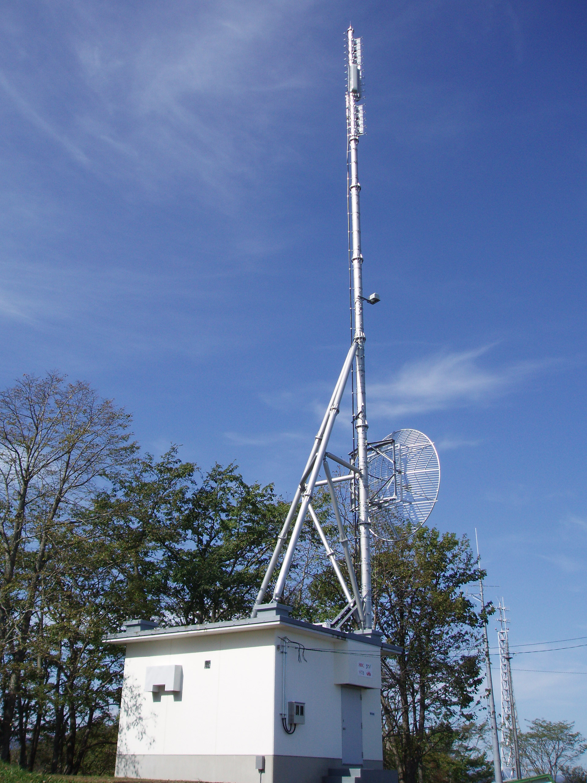 広尾中継局（HTB・UHBアナログ、民放デジタル増設）